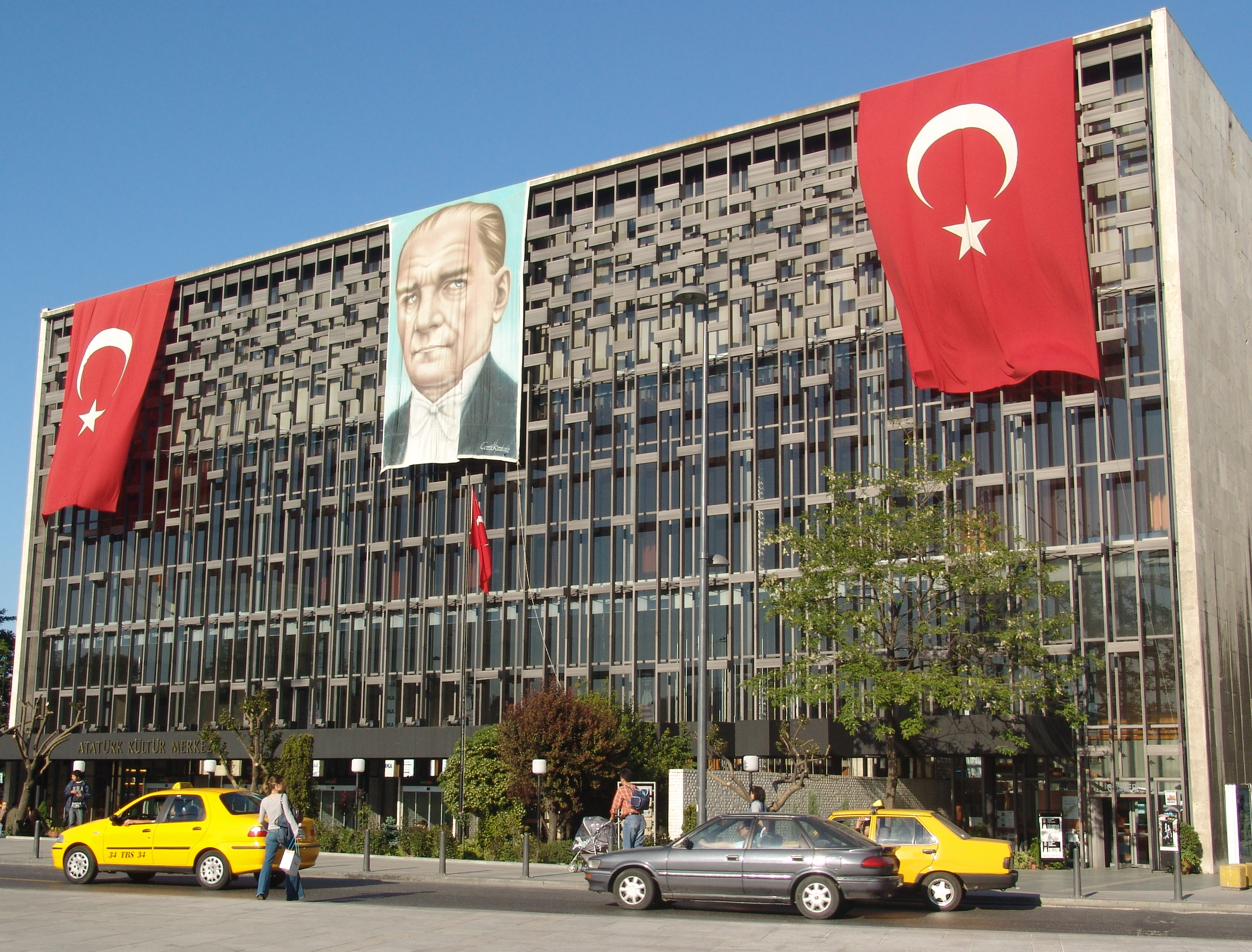 Atatürk Cultural Center in IstanbulDSC03227